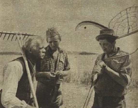 Karel Effa (1922-1993), český herec